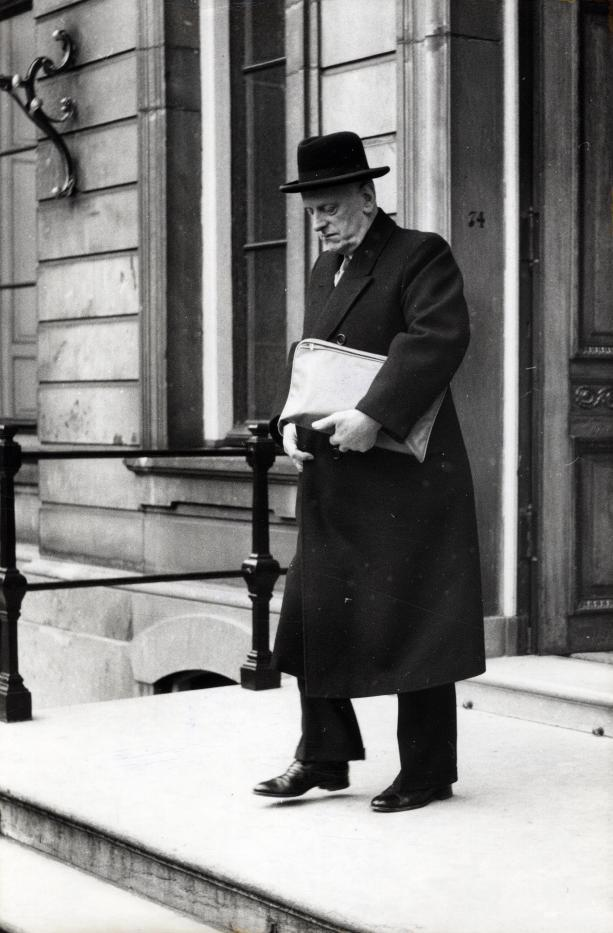 Jonkman, J.A. (PvdA). Kabinetscrisis. Op Paleis Lange Voorhout heeft de koningin als eerste mr. J.A. Jonkman ontvangen, voorzitter van de Eerste Kamer. Nederland, Den Haag, mei 1955.